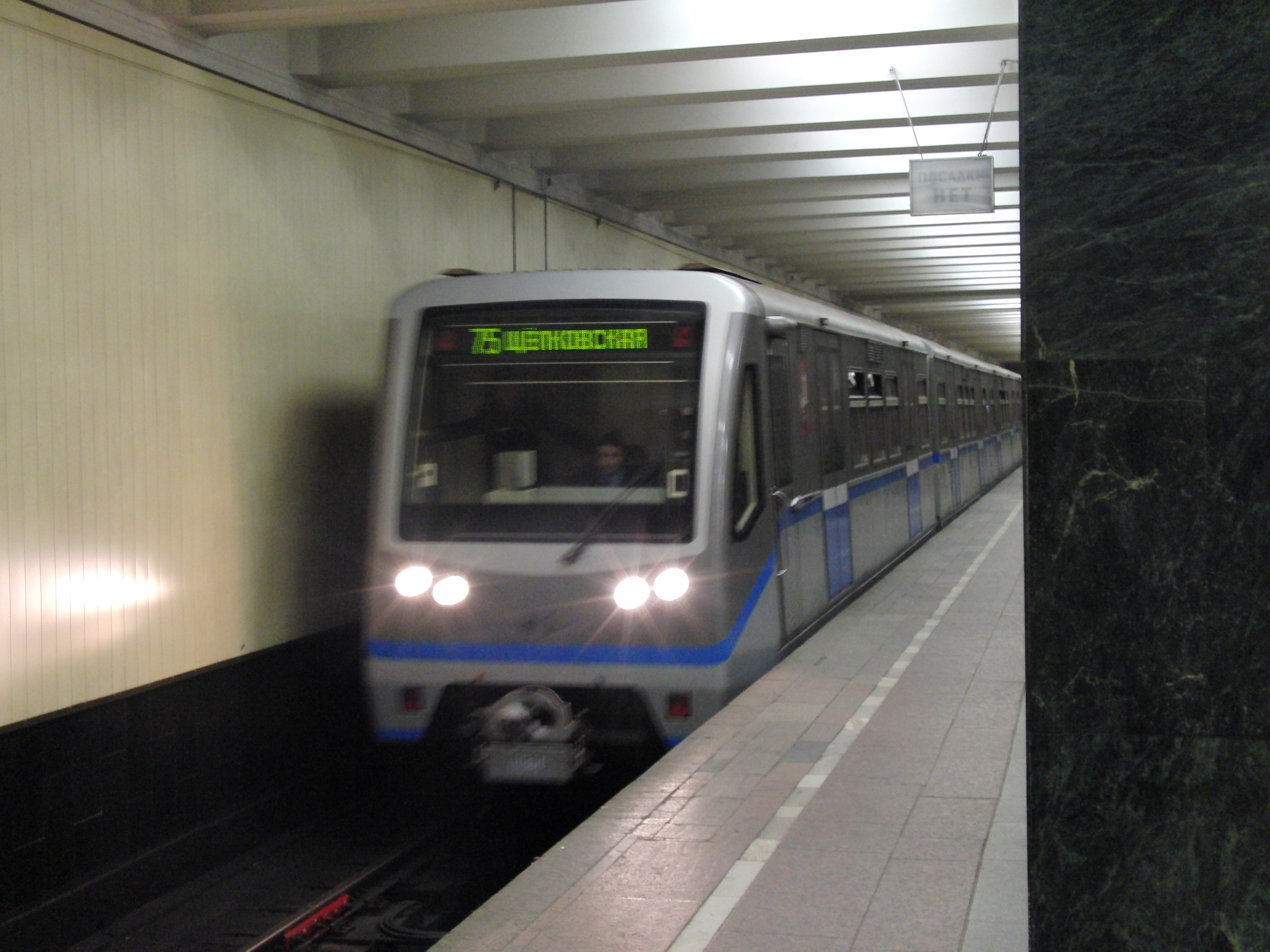 Shcholkovskaya (Щёлковская)